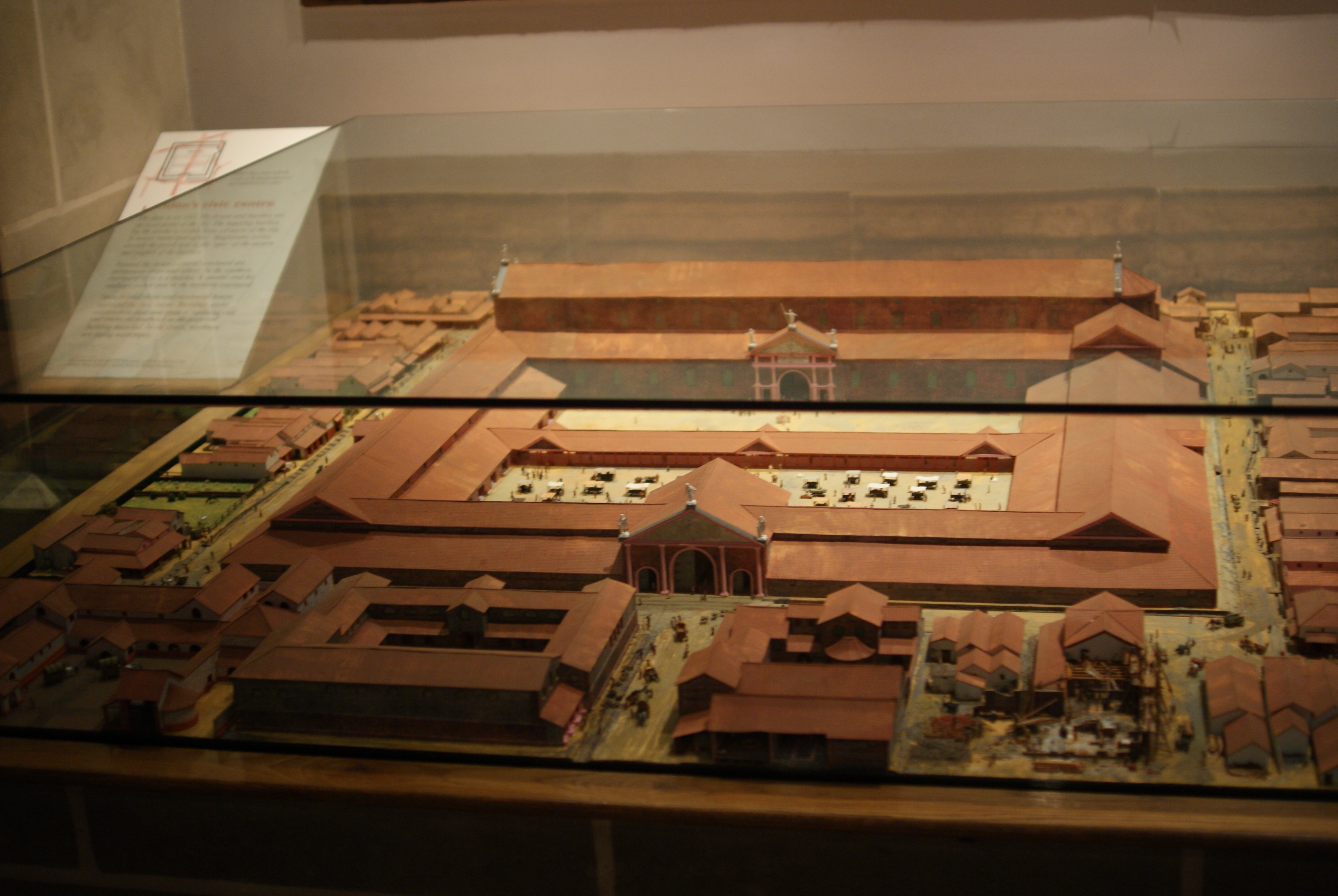 Музей Лондана, 2014